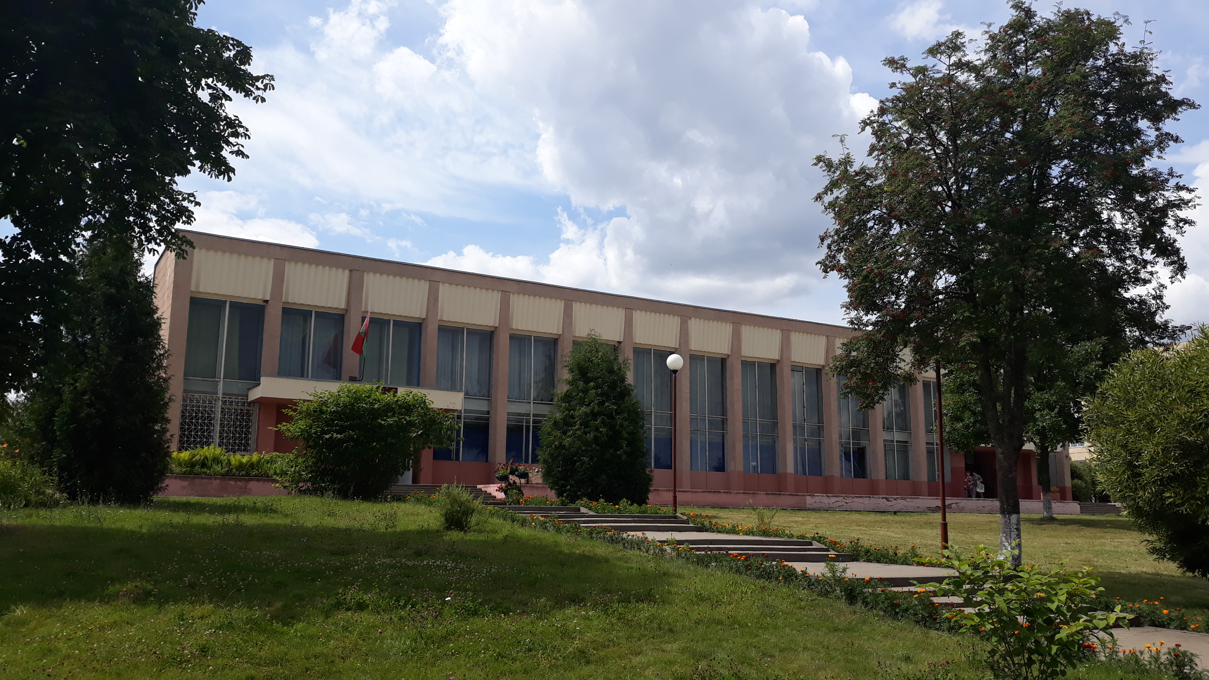 Лугаваслабадскі сельскі дом культуры